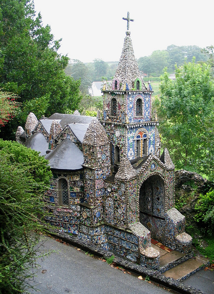 Little Chapel op Guernsey. De foto is op 16 augustus 2004 gemaakt door H. de Vegt.